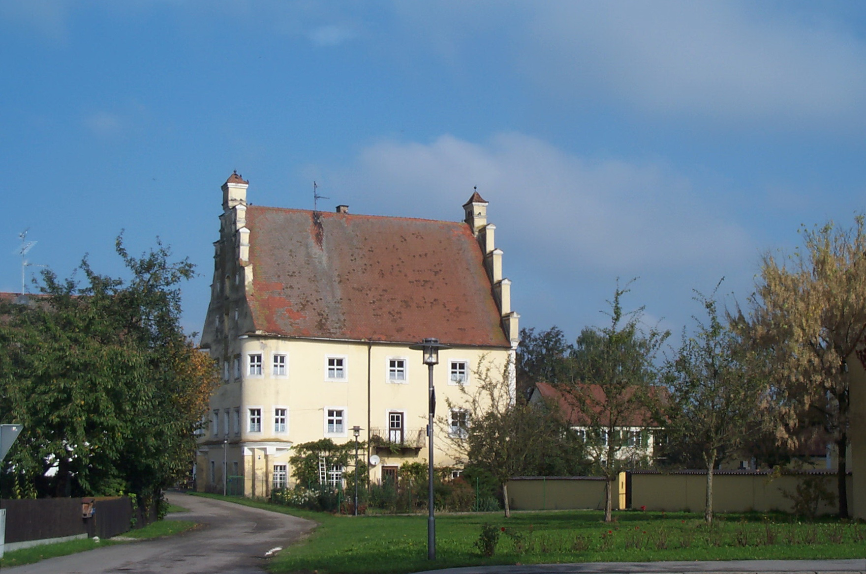 Geiselhöring, Sallach 53a. Schloss. Stattlicher, das Ortsbild beherrschender Bau mit Staffelgiebeln und zwei halbrunden Eckerkern, 1595. Aufnahme vor der Renovierung.